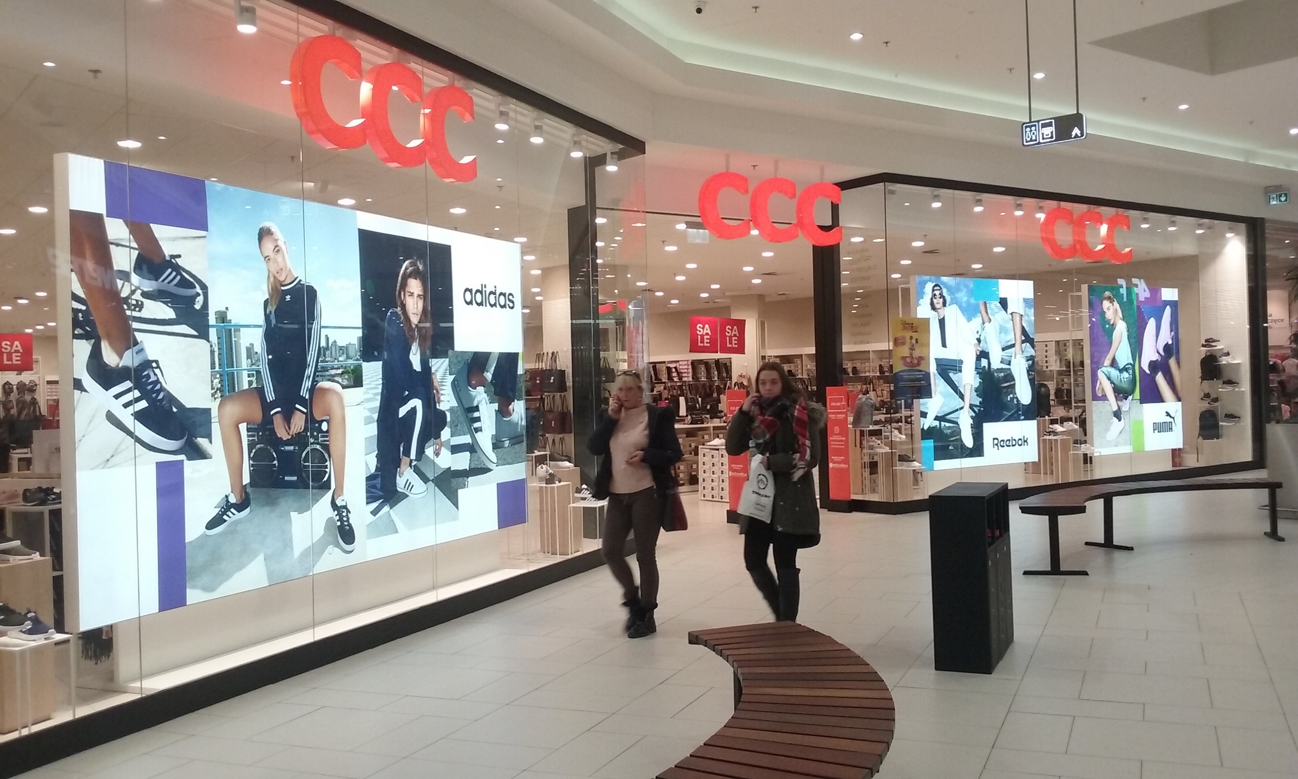 Salon CCC w 60-tysięcznym Tomaszowie Mazowieckim, województwo łódzkie